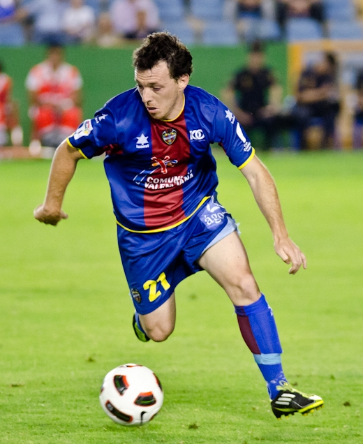 El jugador granota Rubén Suárez Levante Zaragoza 2011: Nikon D7000 - Sigma 70-200mm f/2.8, Exposure 1/500, Aperture f/2.8, Focal Length 200 mm, ISO Speed 2500, Exposure Bias +2/3 EV Camera: Nikon D7000 License on Flickr (2012-02-02): CC-BY-2.0 Flickr tags: Levante UD, Levante, Zaragoza, Liga, BBVA, Ciutat, Valencia, CarlosRM